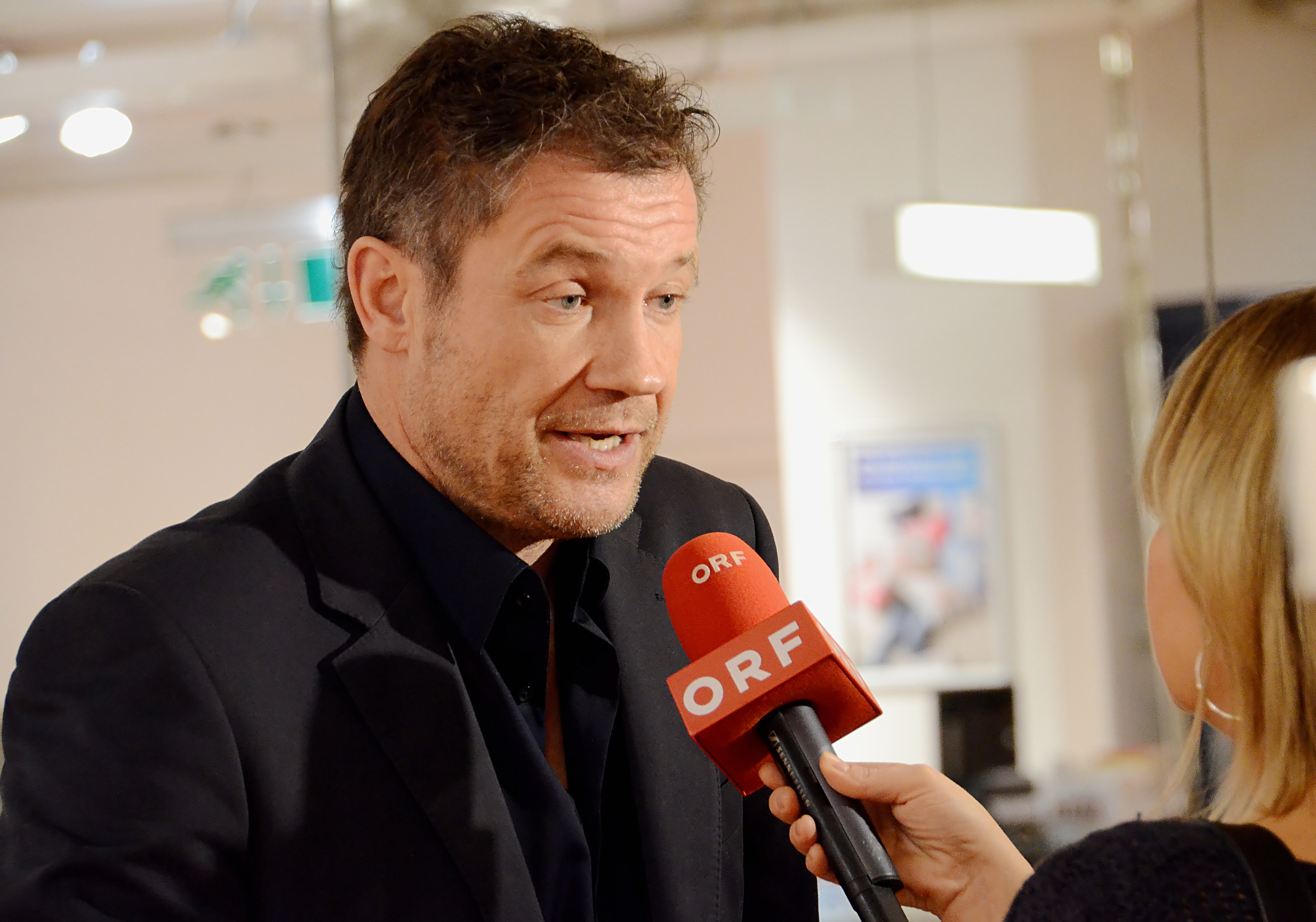 Interviews für ORF Seitenblicke - Armin Assinger bei Buchpräsentation bei Thalia in Wien